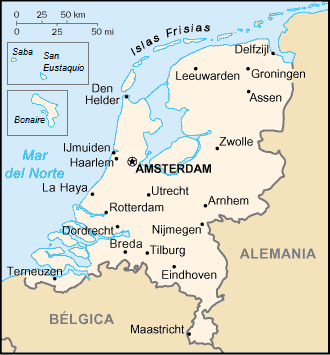 Fuente original: CIA World Factbook. Mapa de Países Bajos traducido por Wesisnay Categoría:Europa (imagen) Categoría:Mapas de Europa (imagen)